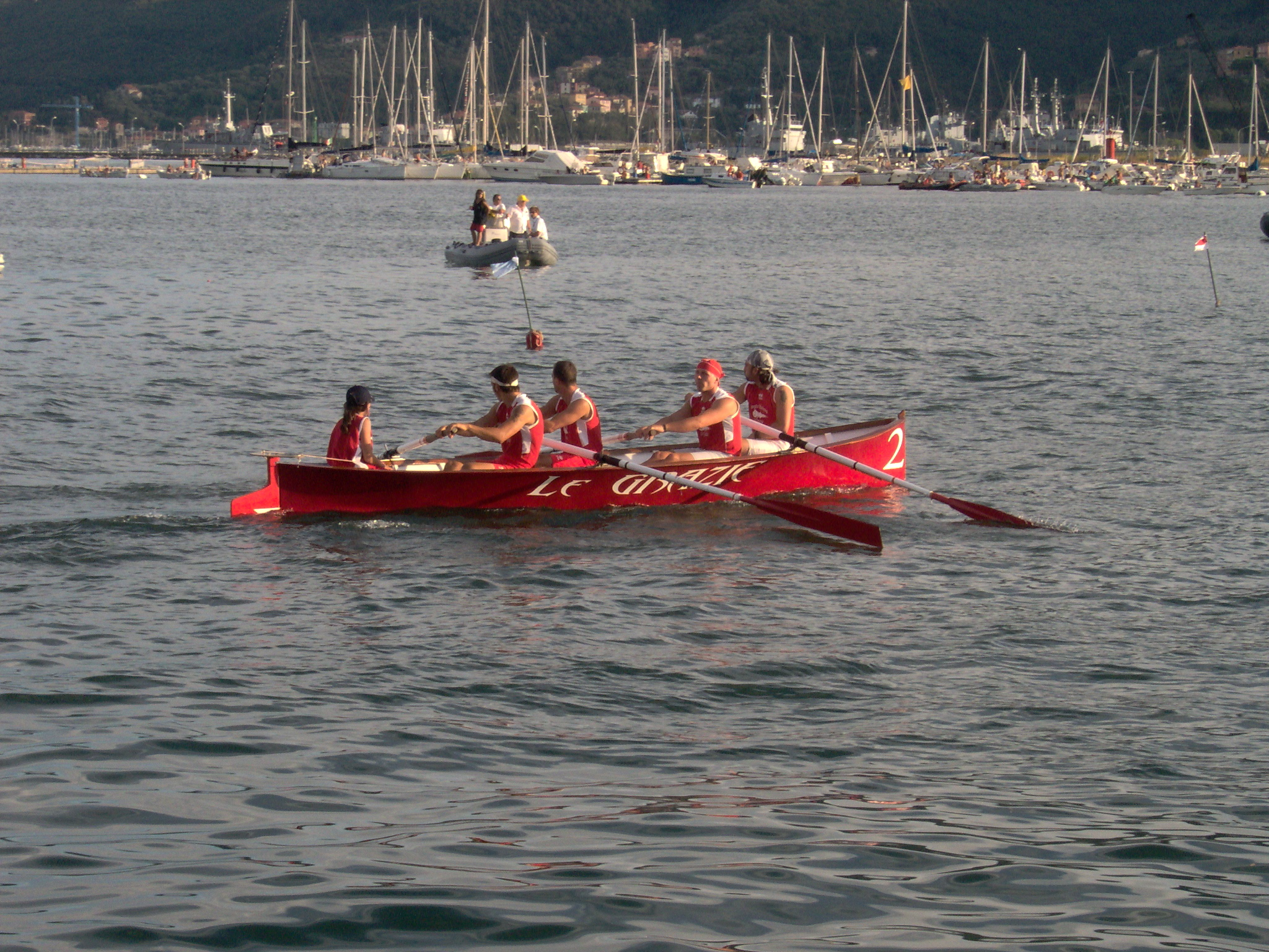 La borgata di Le Grazie durante l'81° Palio del Golfo